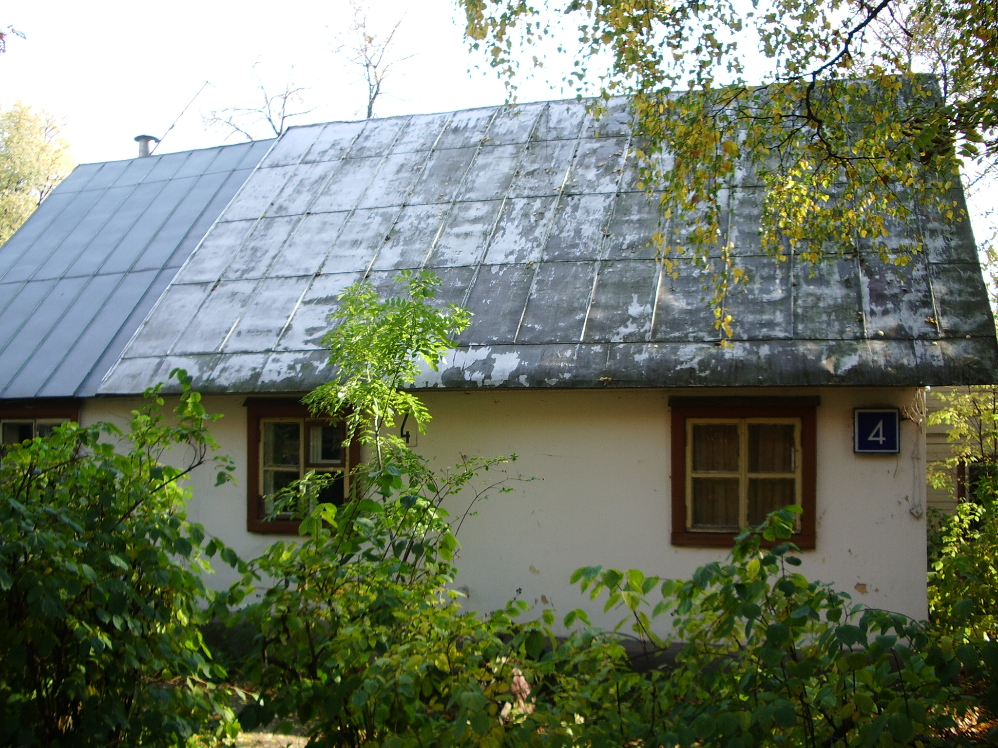 Улица Кипренского, дом 4. Посёлок "Сокол" в Москве.